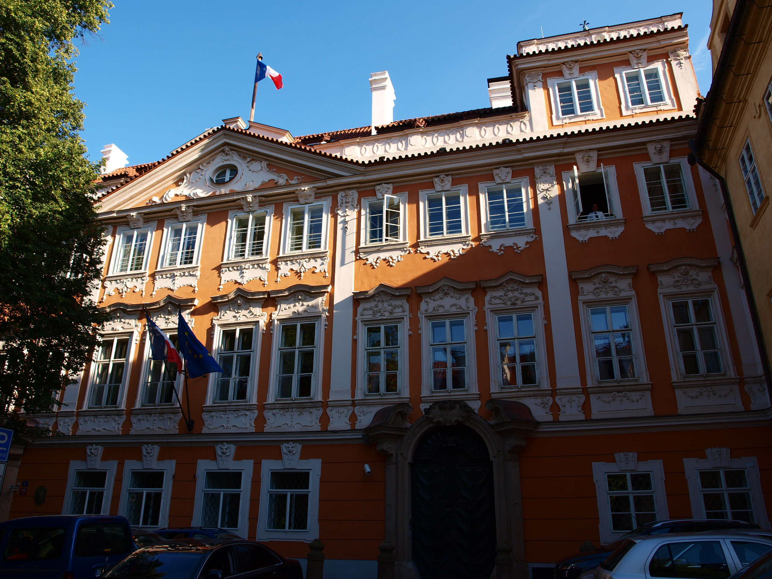 Buquoyský palác